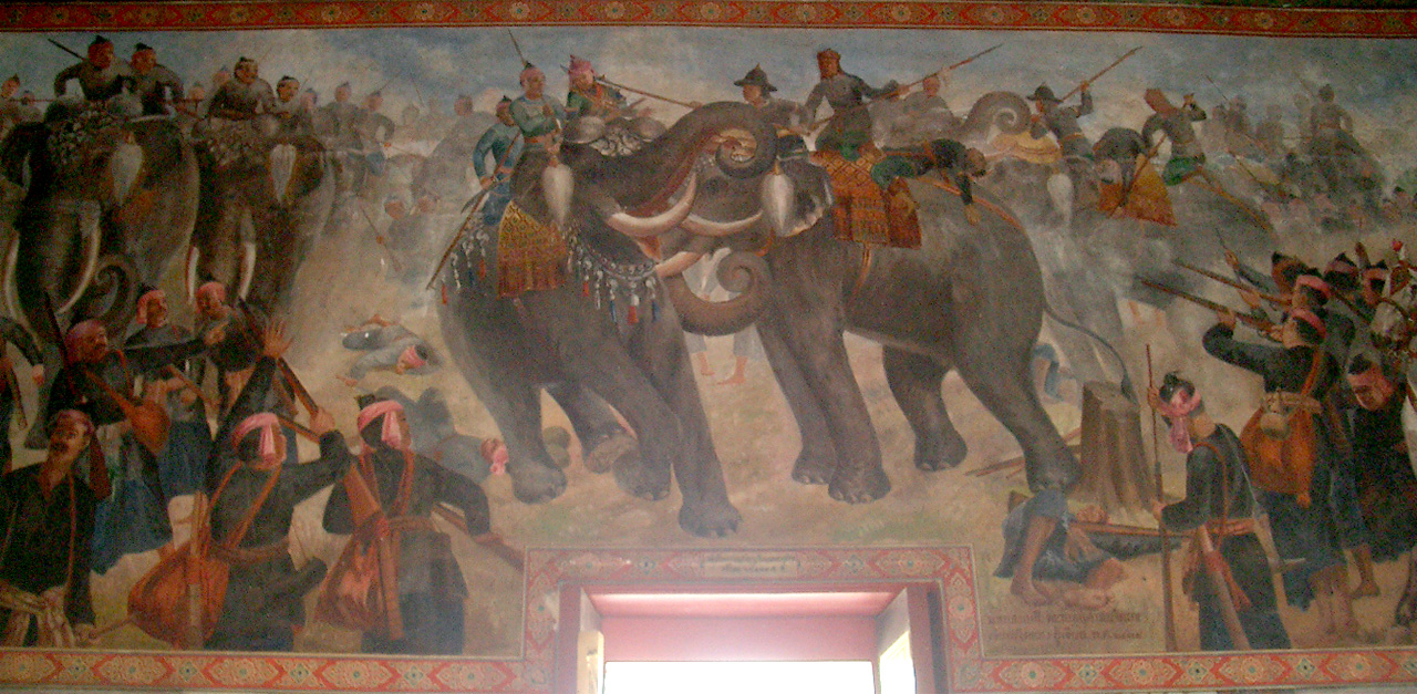 ภาพยุทธหัตถีภายในพระอุโบสถ วัดสุวรรณาดาราม จังหวัดพระนครศรีอยุธยา - Murals in Phra Ubosot, Wat Suwan Dararam, Ayutthaya, Thailand. ถ่ายโดยวลัยภรณ์ นาคพันธุ์ เมื่อ 25 มีนาคม 2549